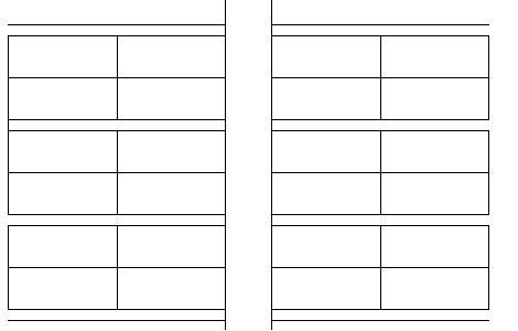 Plan de lotissement initial de l'Île de Mai